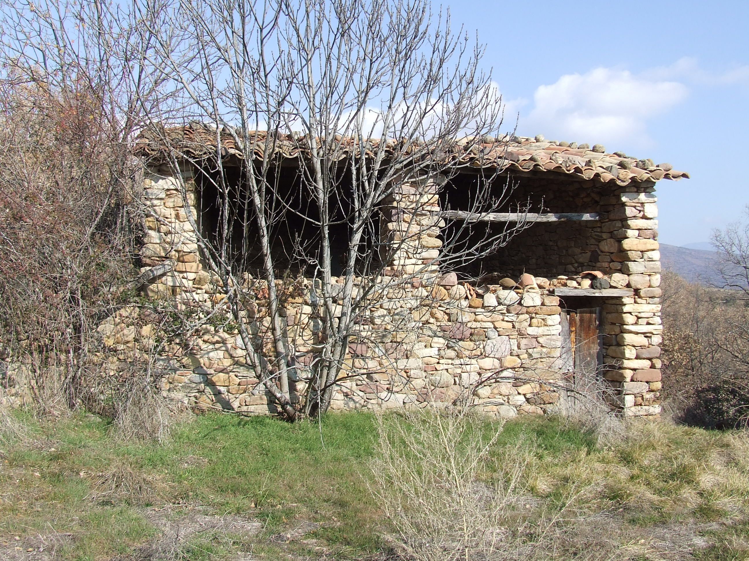 Borda de Batllevell, paller (Bordes d'Estavill, la Pobleta de Bellveí, la Torre de Cabdella, Pallars Jussà)